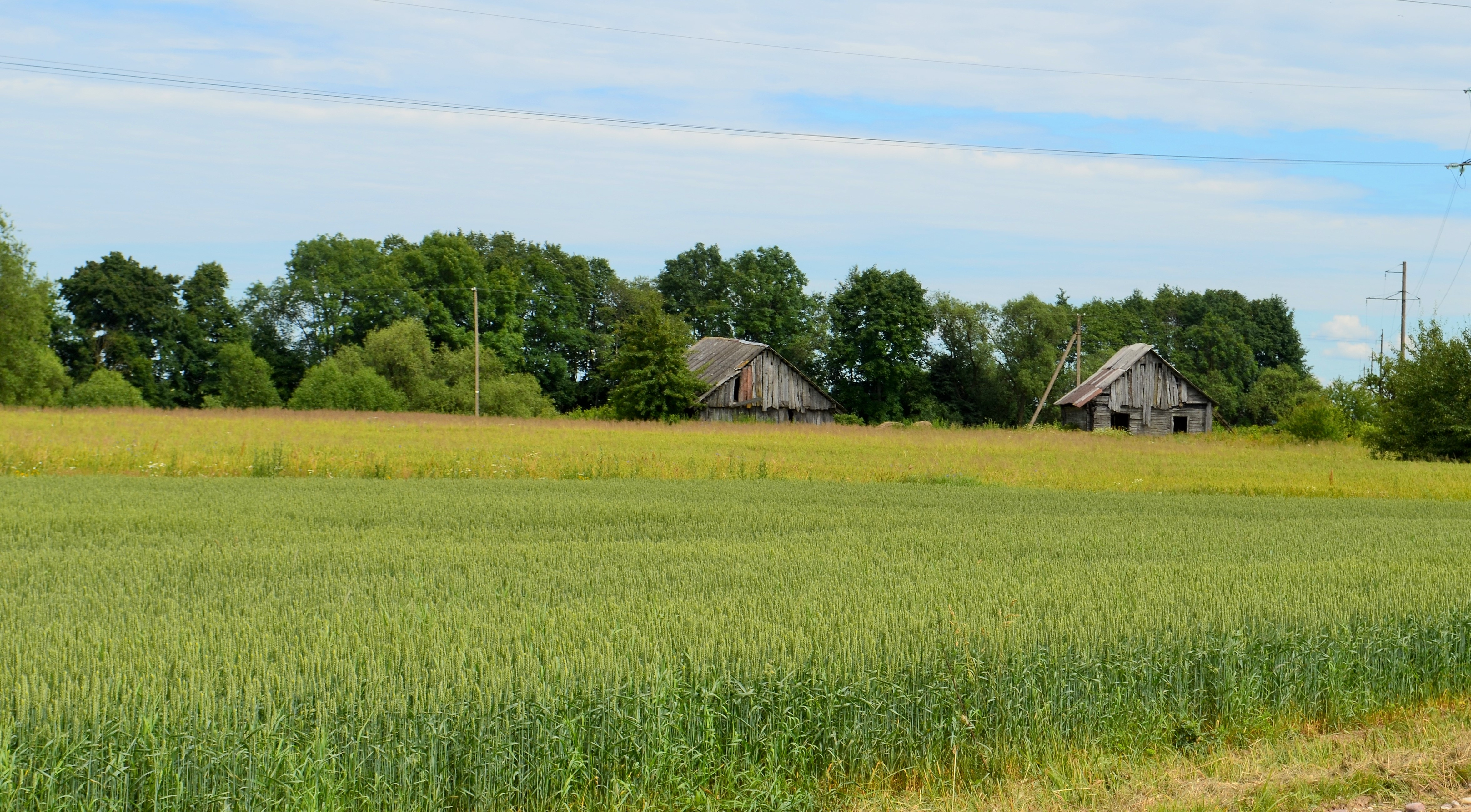 Pakščiai, Kėdainių raj.